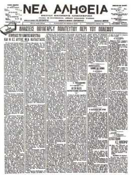 Главата на вестник "Неа Алития".